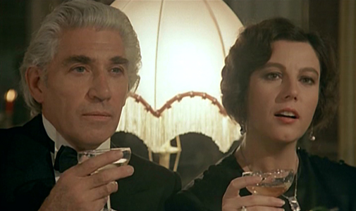 Képkocka „A kulcs” című filmből (Frank Finlay és Stefania Sandrelli)